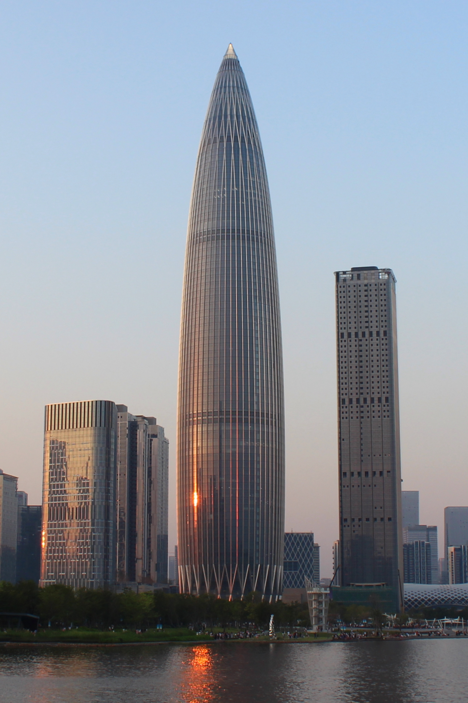 China Resources Headquarters, le 03 octobre 2018 Shenzhen, Guangdong, China